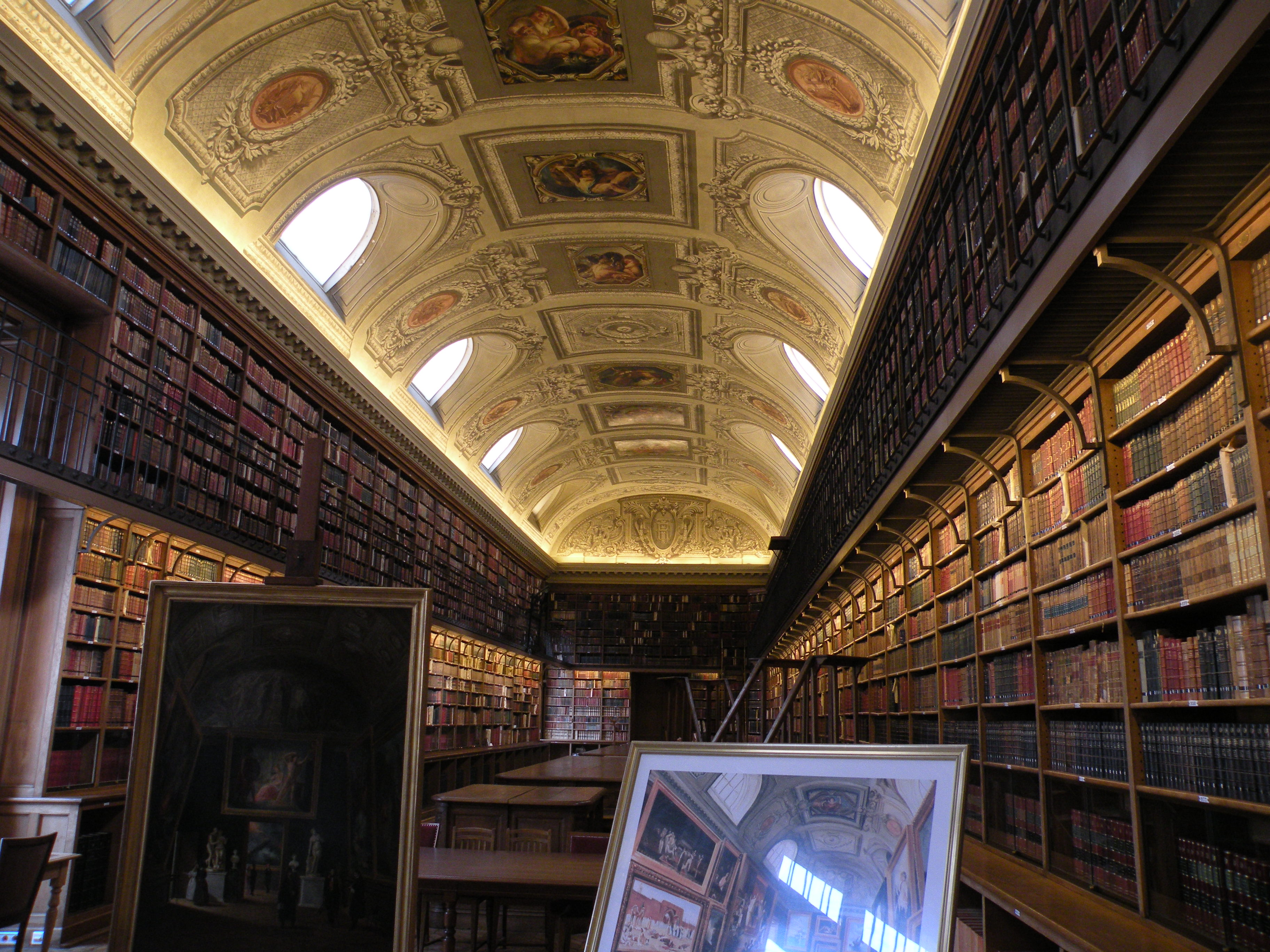 annexe de la bibliotheque du palais du luxembourg